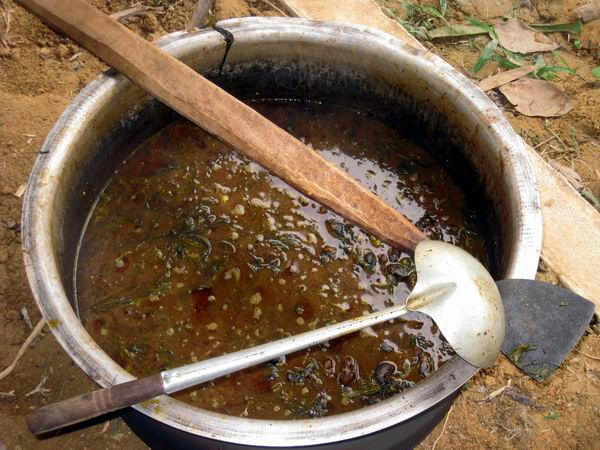 gambar gulai asam rong